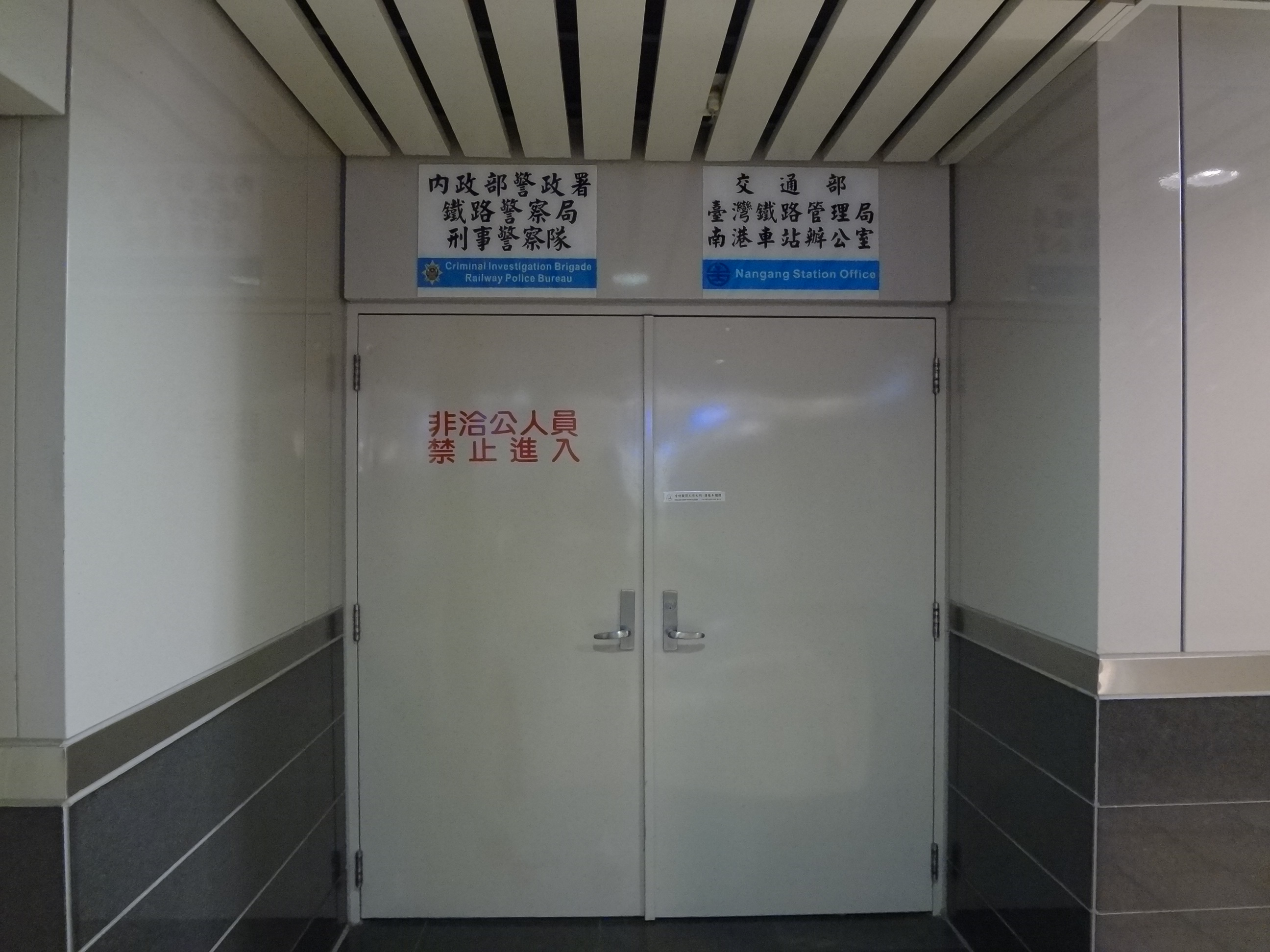 臺灣鐵路管理局南港車站辦公室與內政部警政署鐵路警察局刑事警察大隊辦公室。